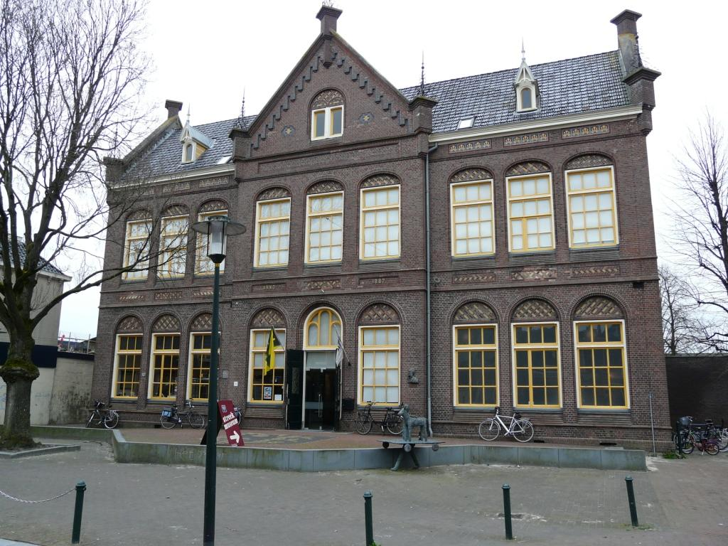 Museum Opsterlân. Eigen wurk Drewes